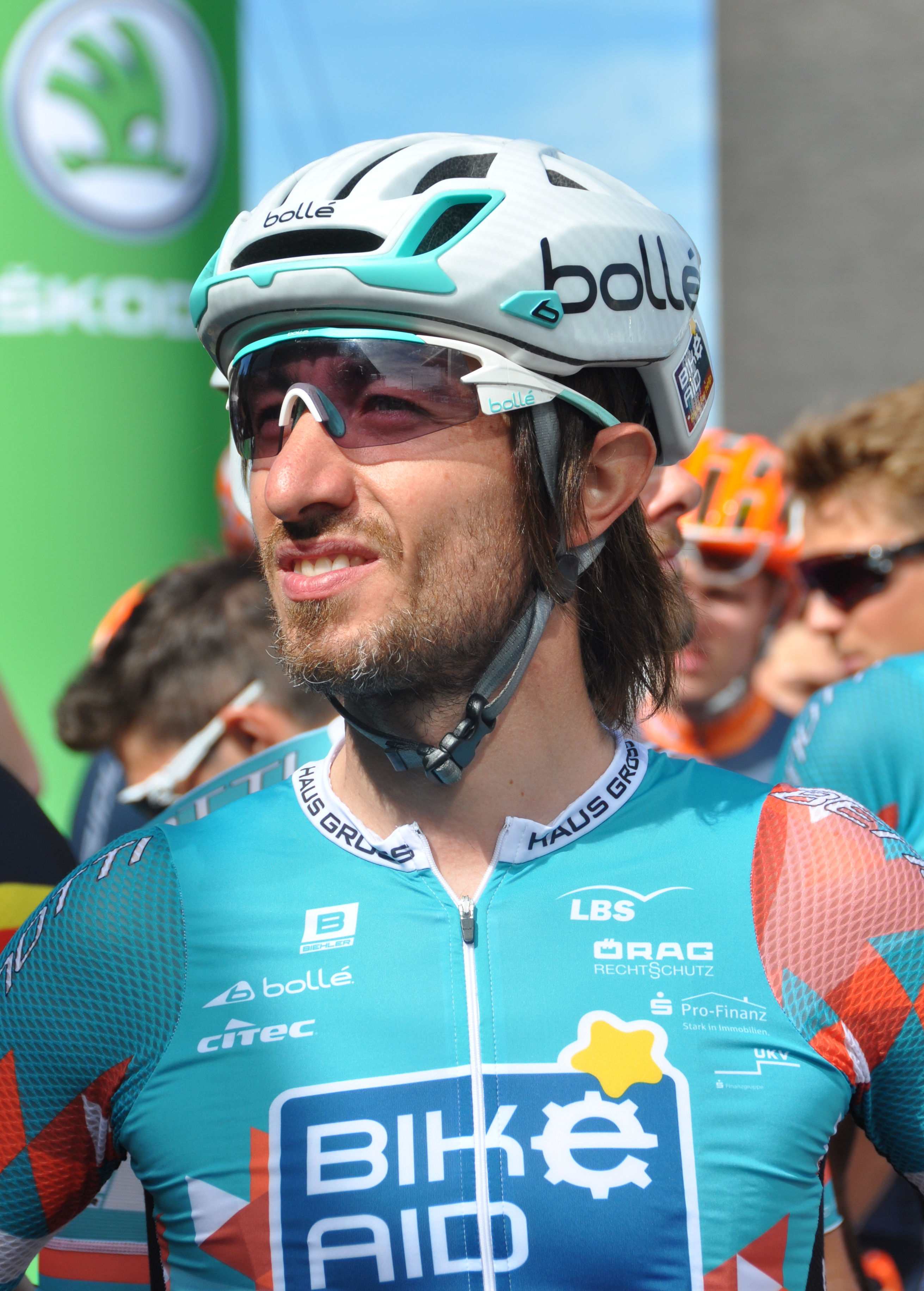 Timo Schäfer, deutscher Radrennfahrer